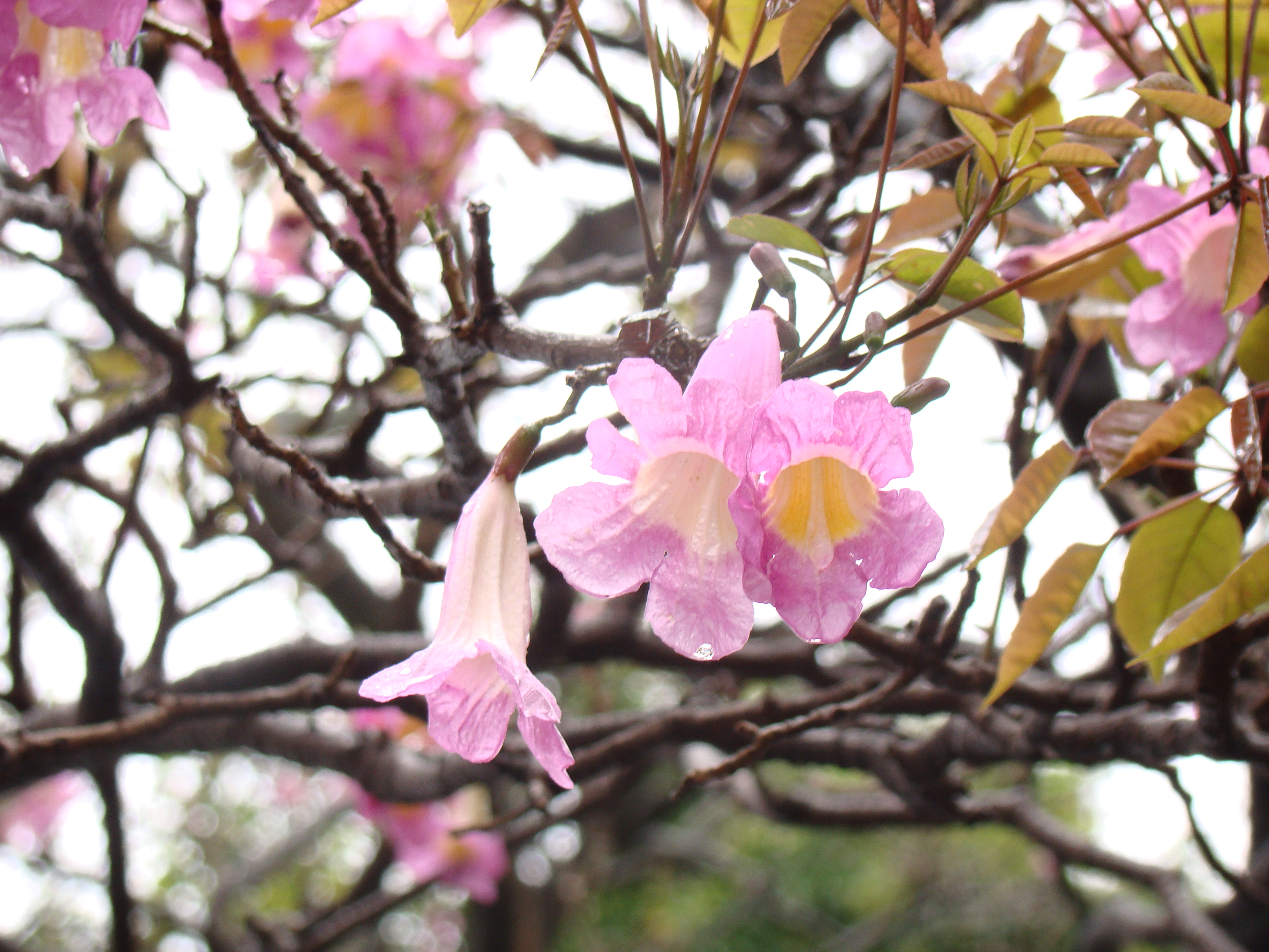 my street sao paulo